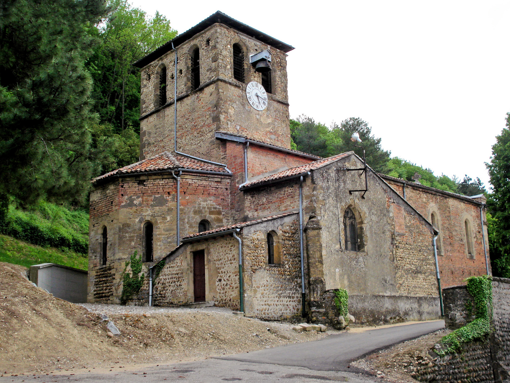 église de Moras en Valloire dans la Drôme,construite au XIe-XIIe siècle, elle n'a gardé de ses origines romanes que son chevet en abside et son clocher.